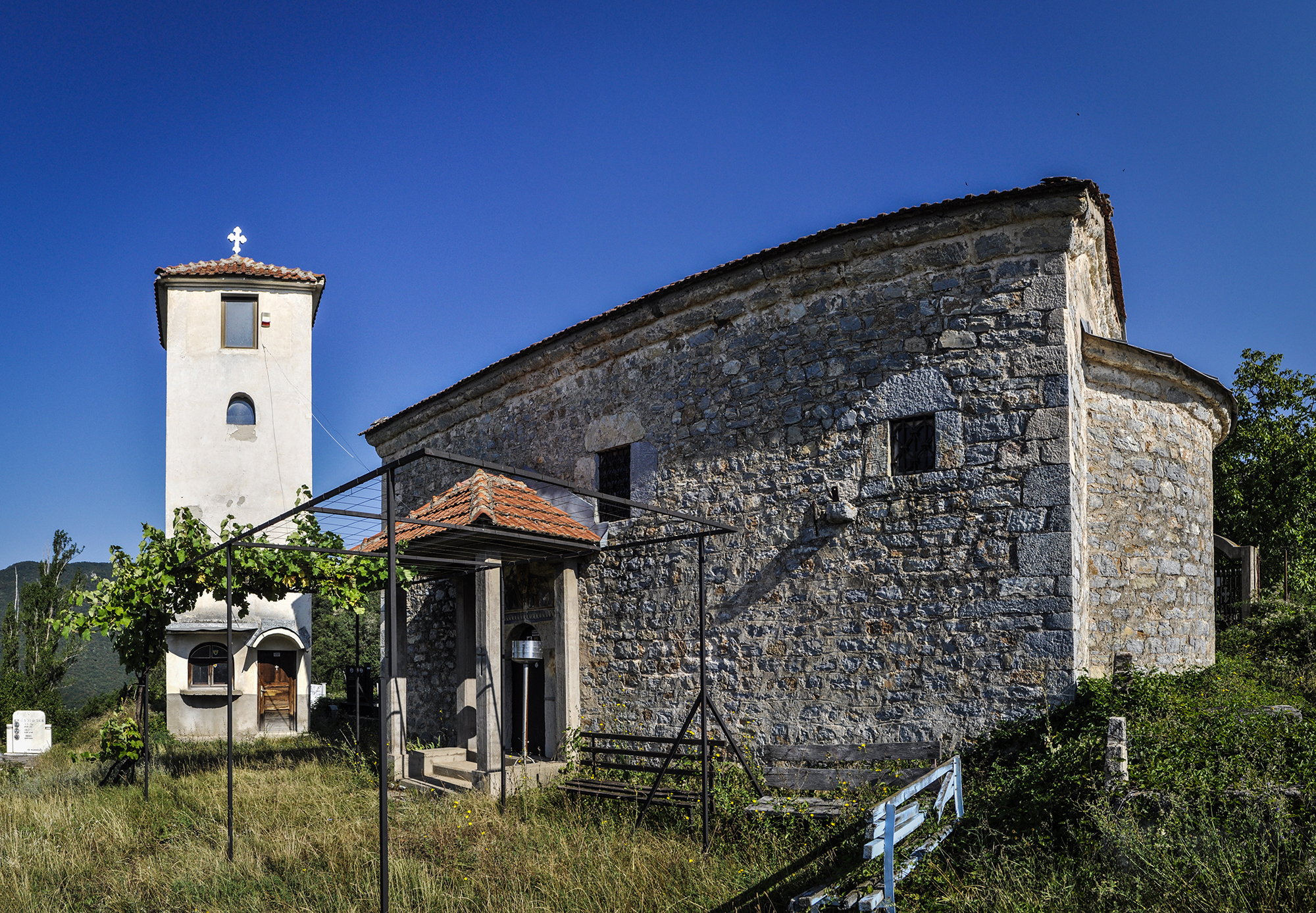 Селската црква Свети Никола во селото Присовјани, Малесија.